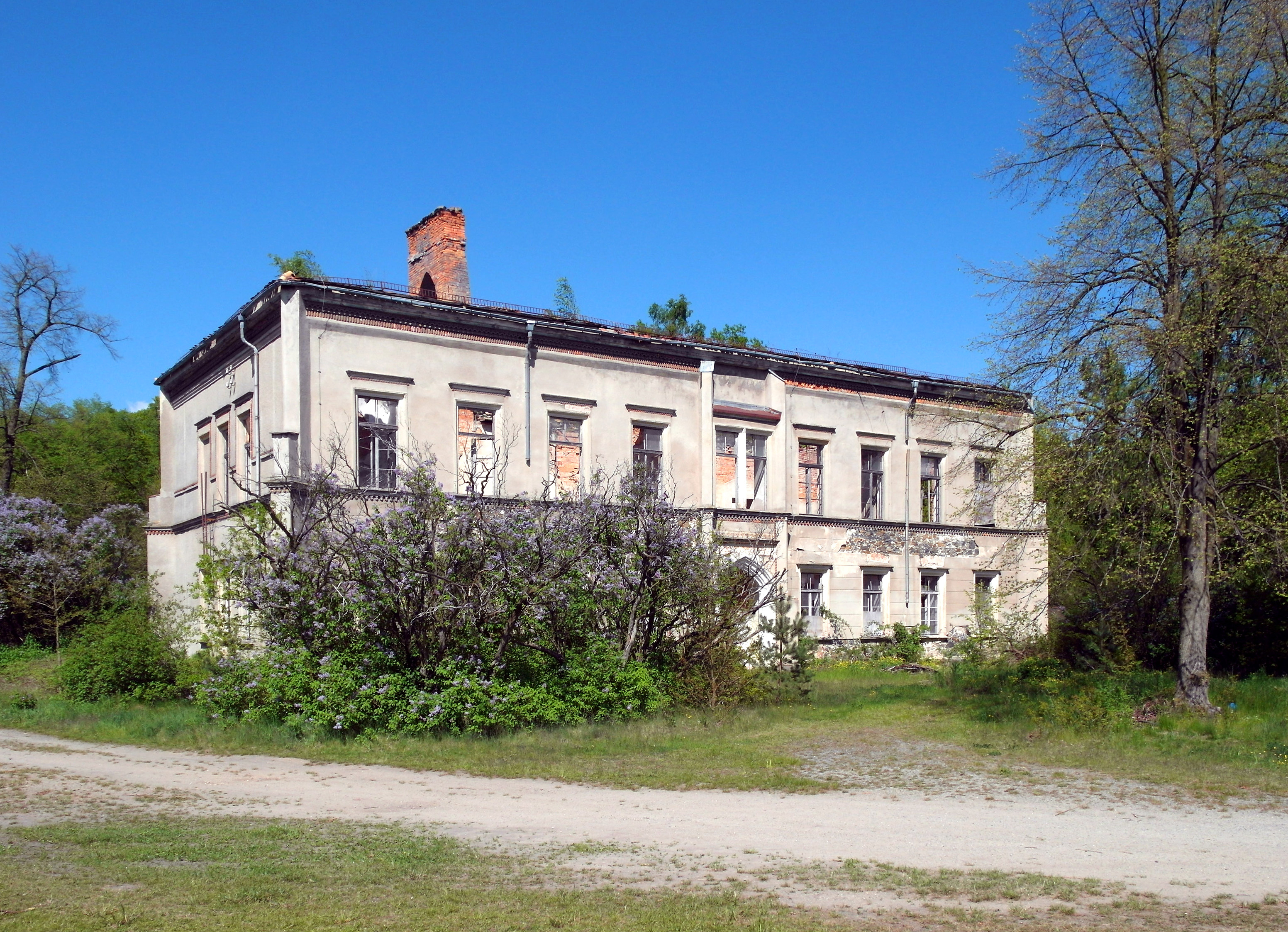 09.05.2016 02994 Schwepnitz: Herrenhausruine (GMP: 51.332819,13.963108) Schwepnitz. Die Vorgeschichte reicht bis ins 16. Jh. zurück. 1848 läßt Ernst Heinrich Feurich das heutige Herrenhaus im Stile der englischen Tudorgotik errichten, nachdem der Vorgängerbau durch Blitzschlag abgebrannt war. 1945 wurde der letzte Vorkriegseigentümer, Arndt von Wolffersdorf, enteignet. In der DDR diente das Herrenhaus als Schule. Heute ist es in Privatbesitz. [SAM5872.JPG]20160509715DR.JPG(c)Blobelt